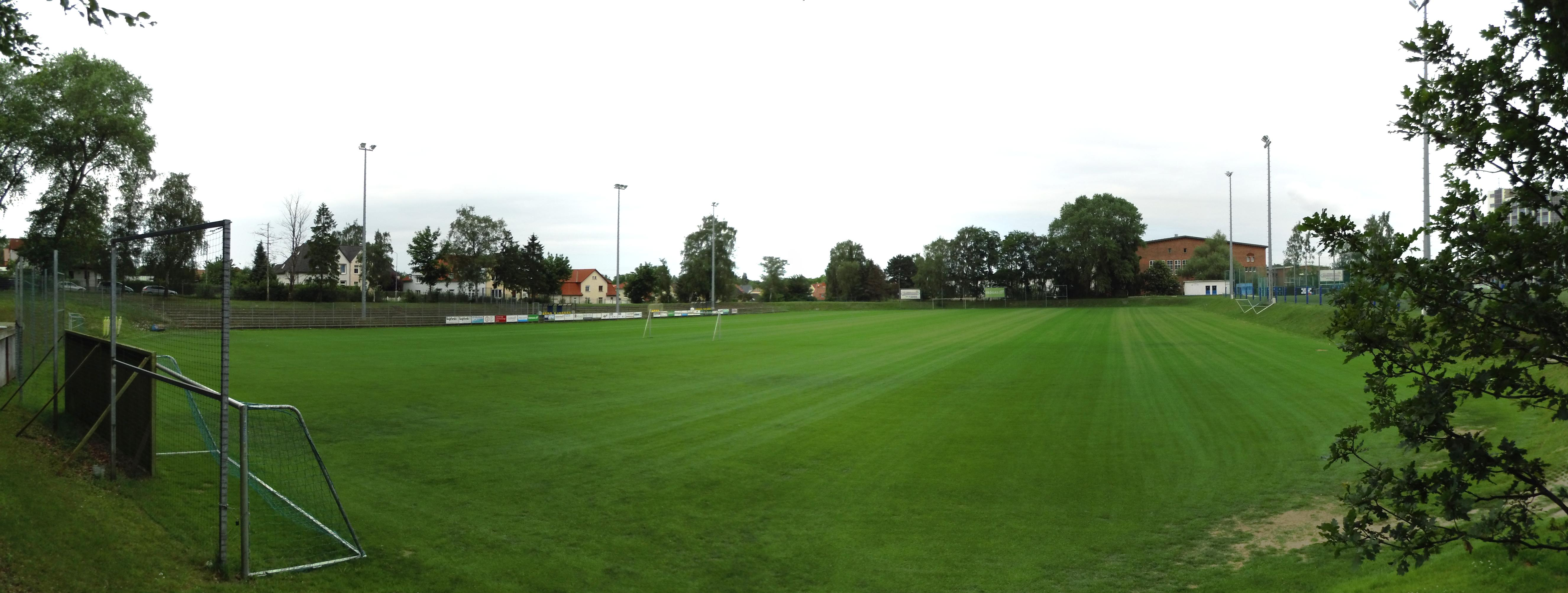 Das Volksstadion in Rostock, am Trotzenburger Weg